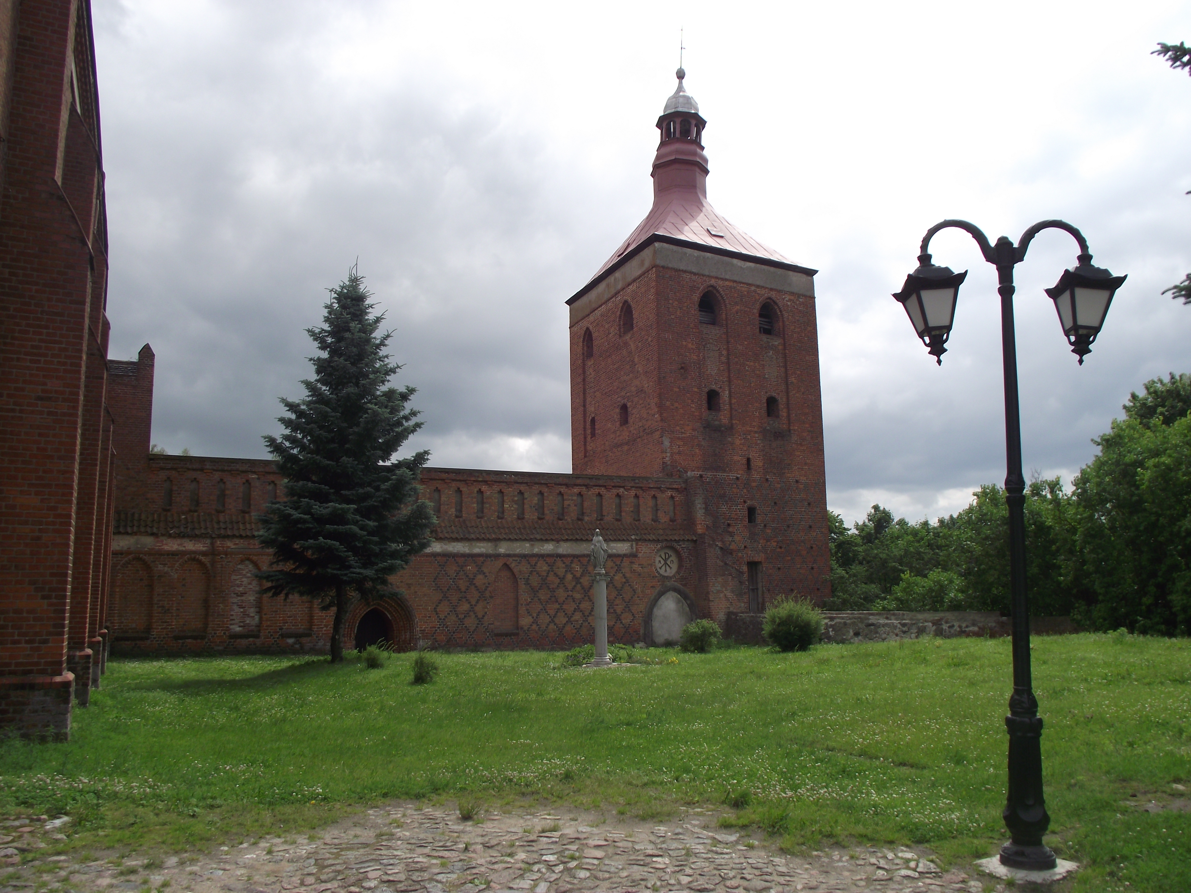 Miłomłyn -wieża dzwonnicza [ 1280 r. ]